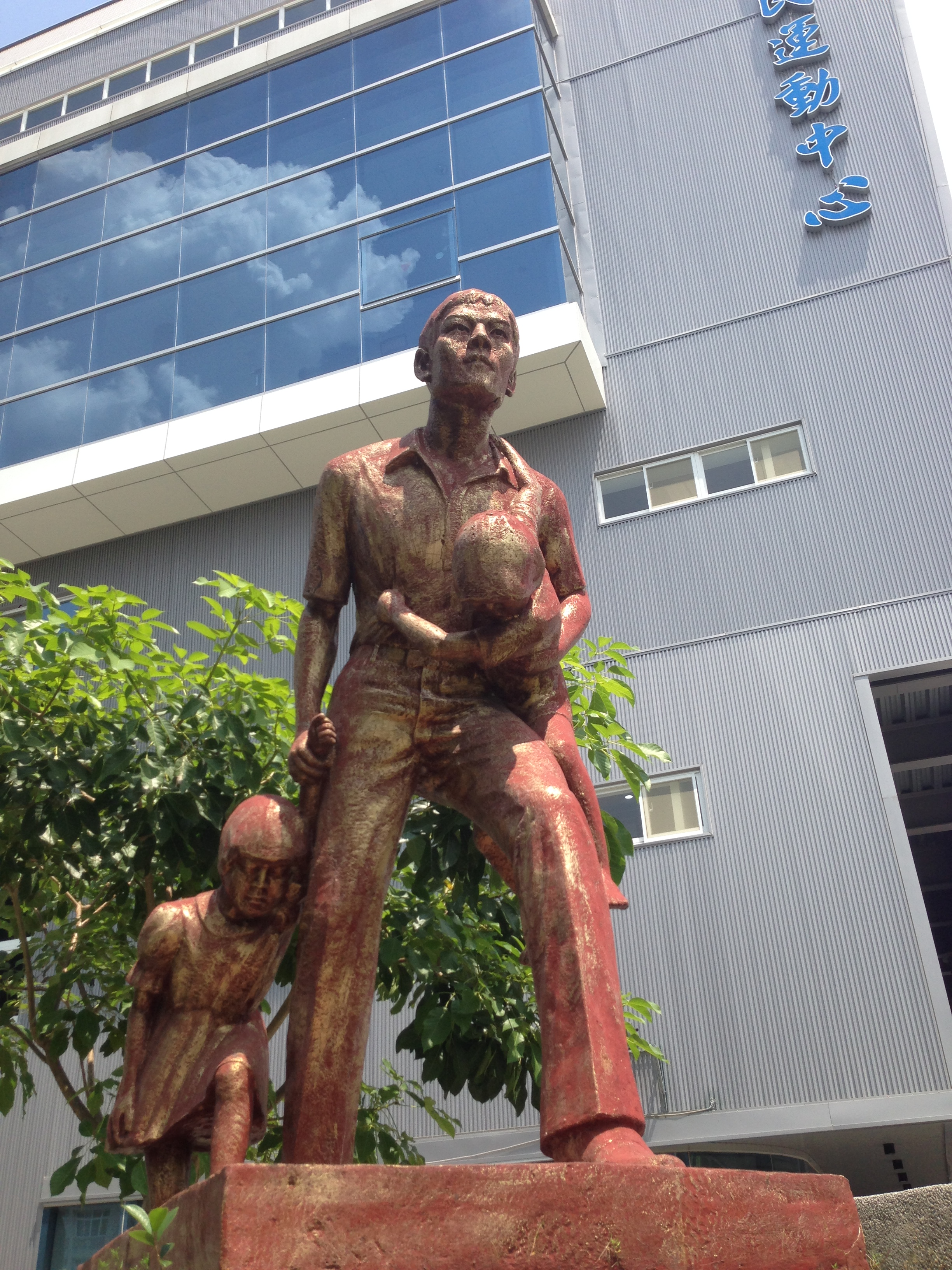 丁清祥銅像，位於屏東市國民運動中心前。